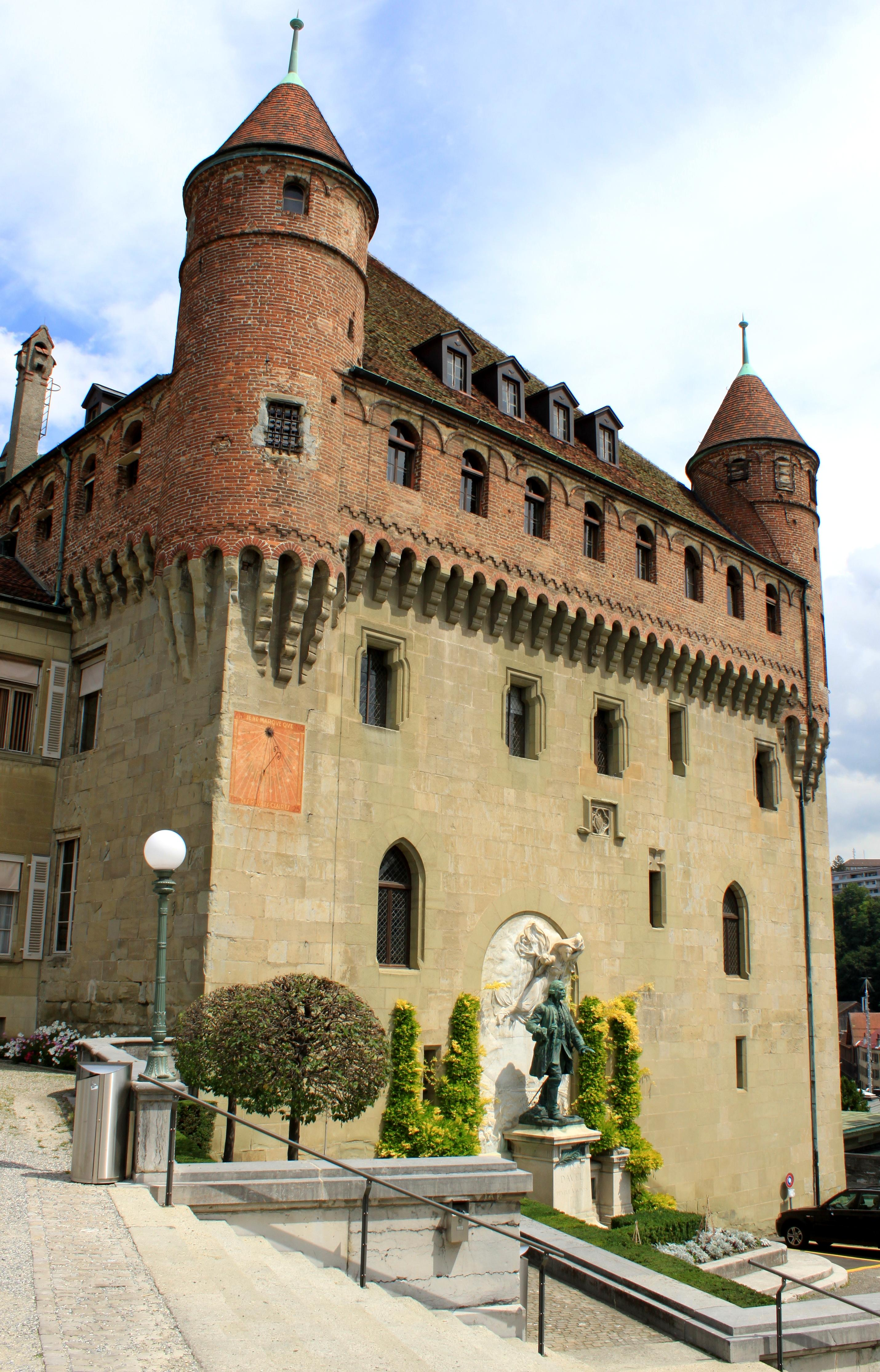 Suisse, canton de Vaud, Lausanne, Château Saint-Maire. Construit dès 1396 pour devenir la résidence des Evêques. Aujourd'hui, siège du gouvernement. Ne se visite pas. Classé depuis 1920.